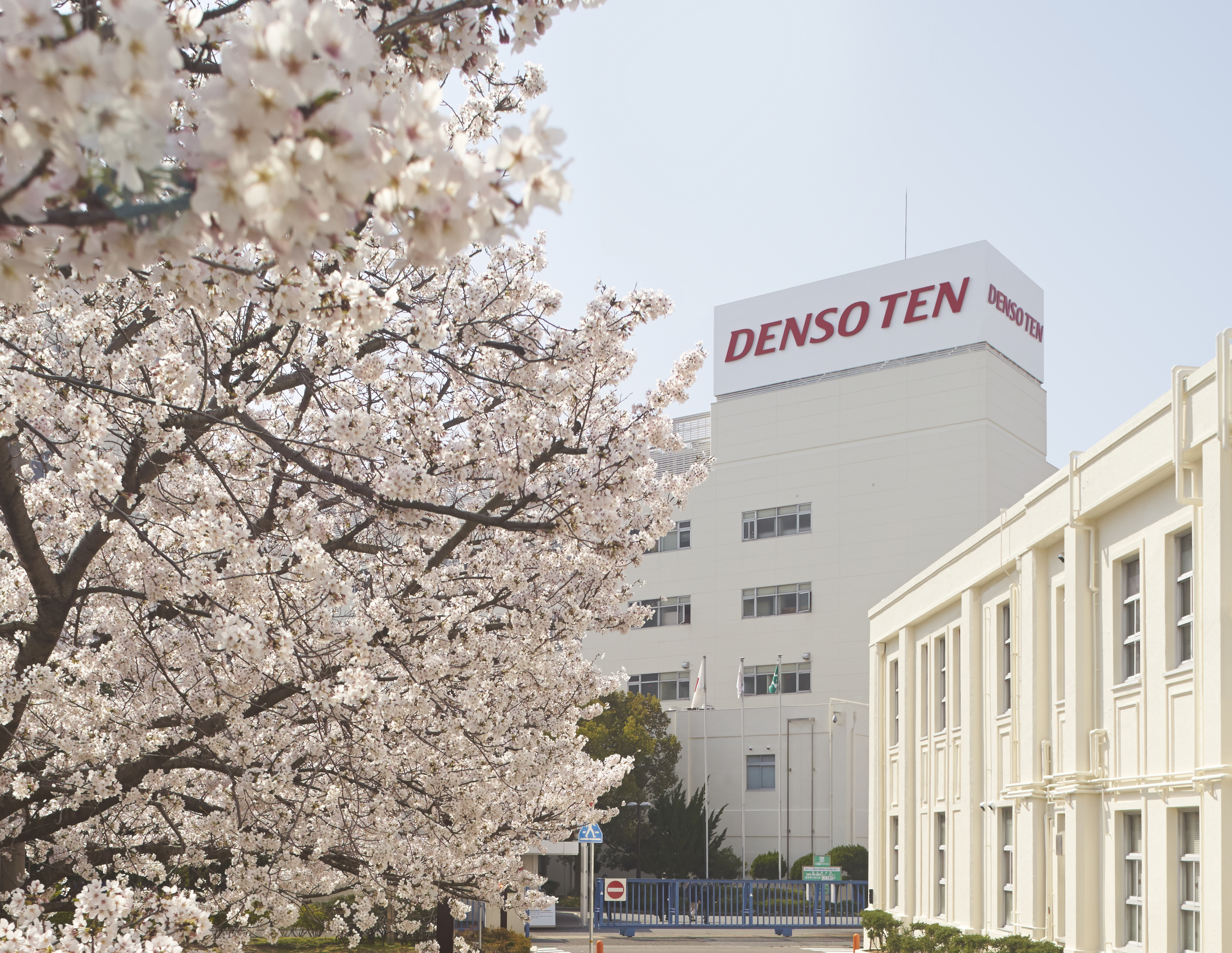 カーエレクトロニクスメーカー、株式会社デンソーテンの公式サイトです。インフォテインメント機器、電子制御機器、衝突安全・予防安全機器、テレマティクス機器の製造、販売および関連サービスを主な事業としています。